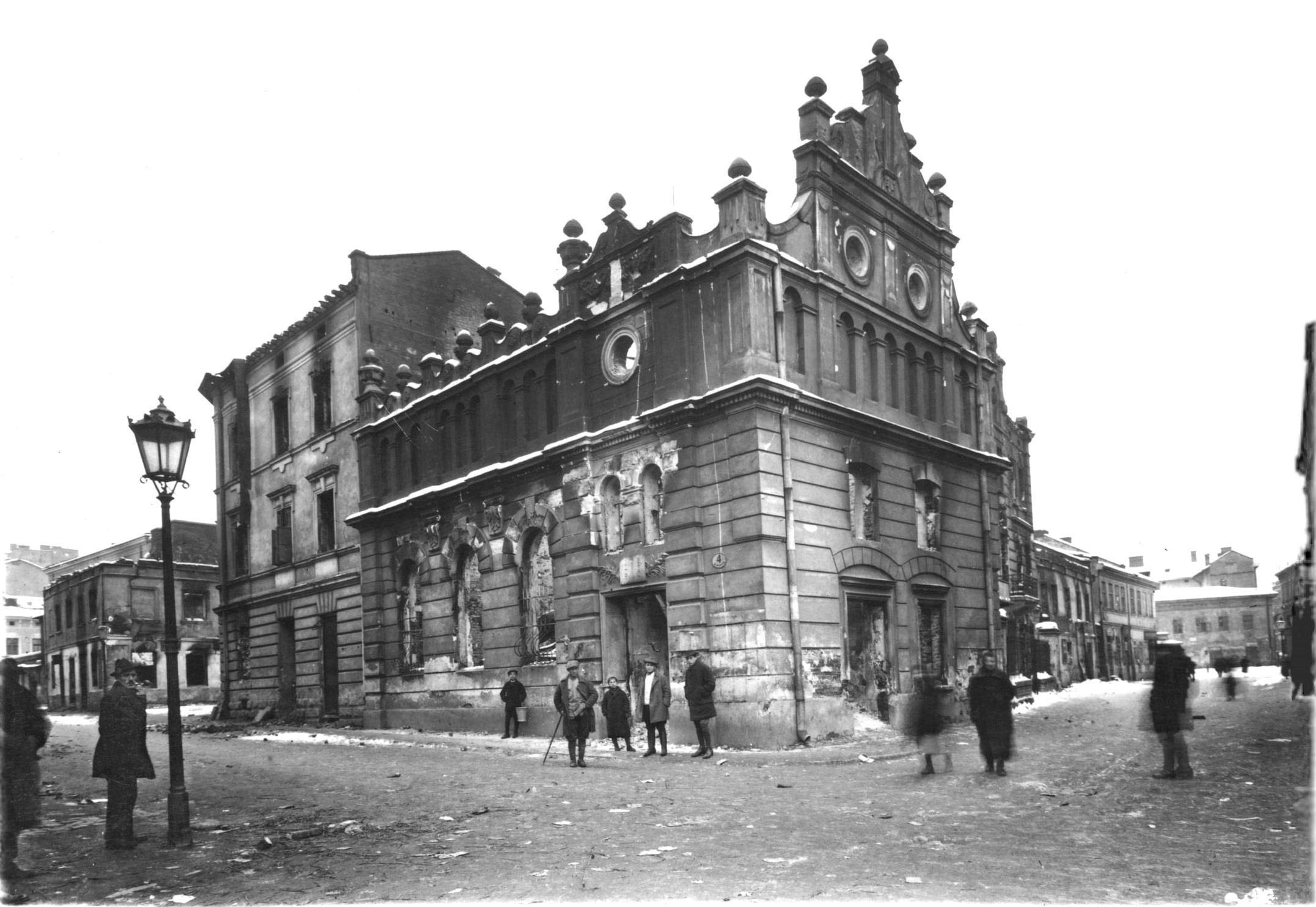 Фотографія львівської синагоги Хасидим Шуль, зроблена після погрому польськими військами 1918 року.